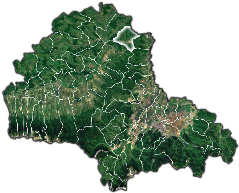 Racos jud Brasov